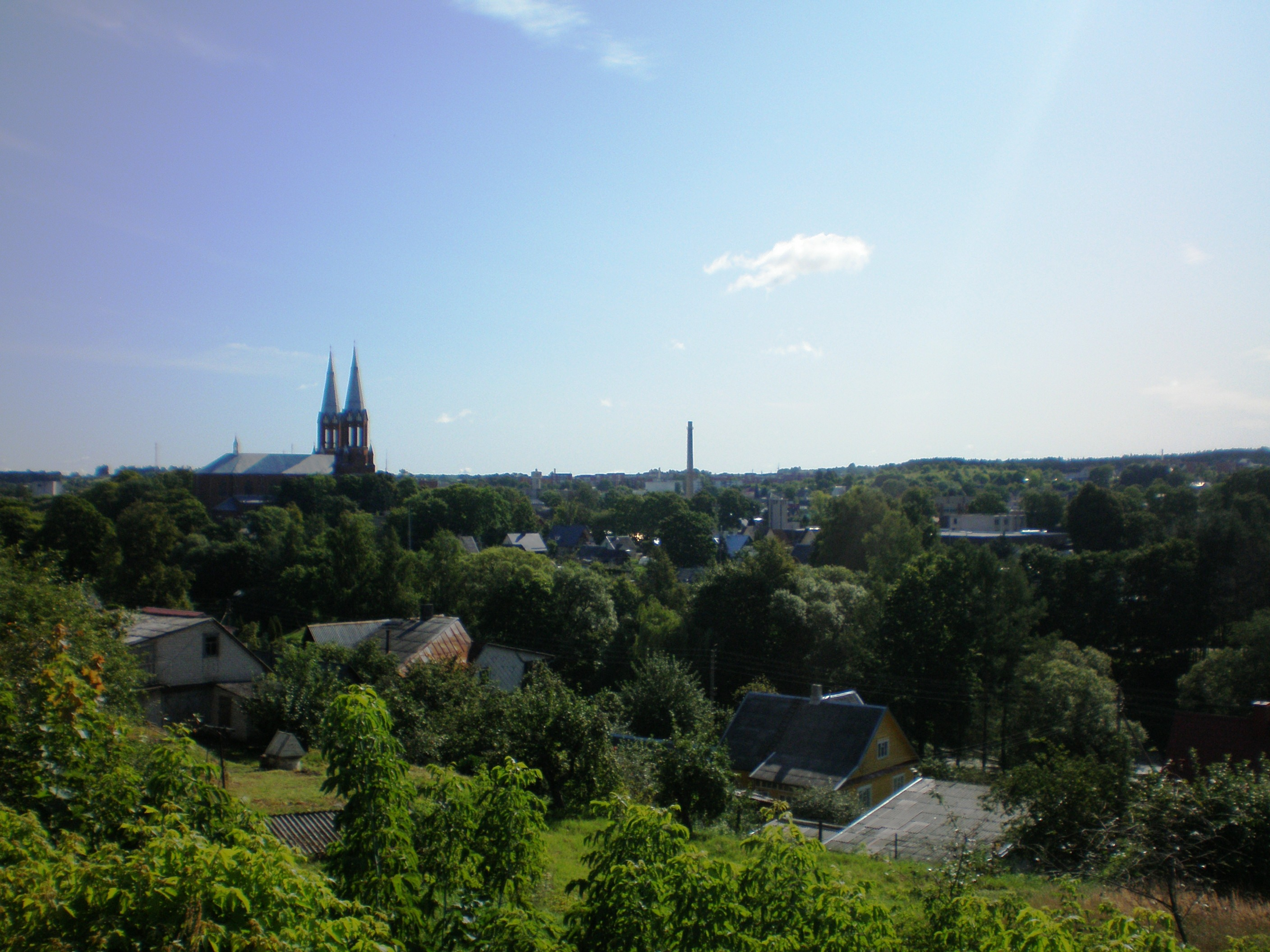 Anykščiai, Lietuva